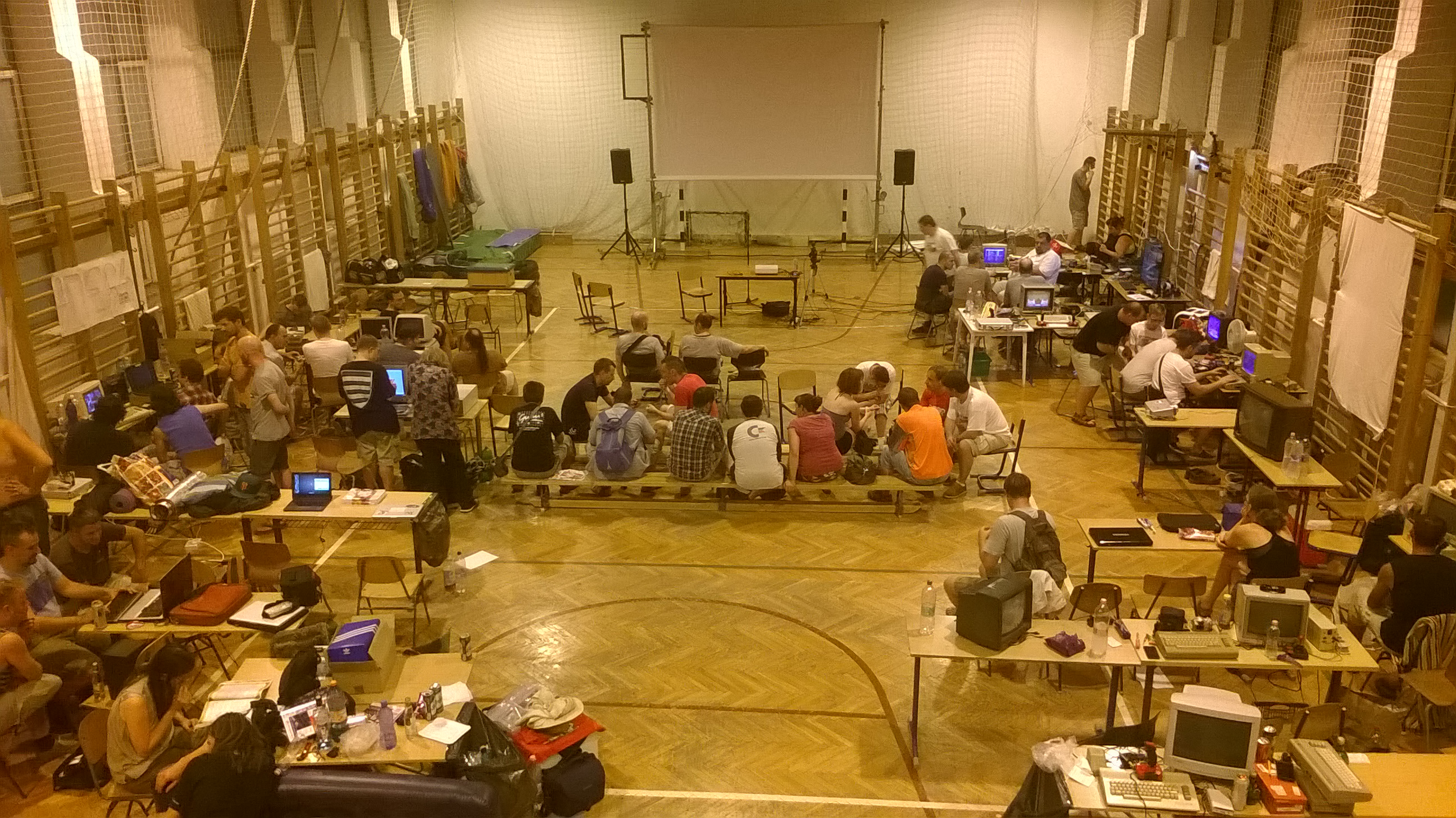 Árok party 2015, Ajkarendek